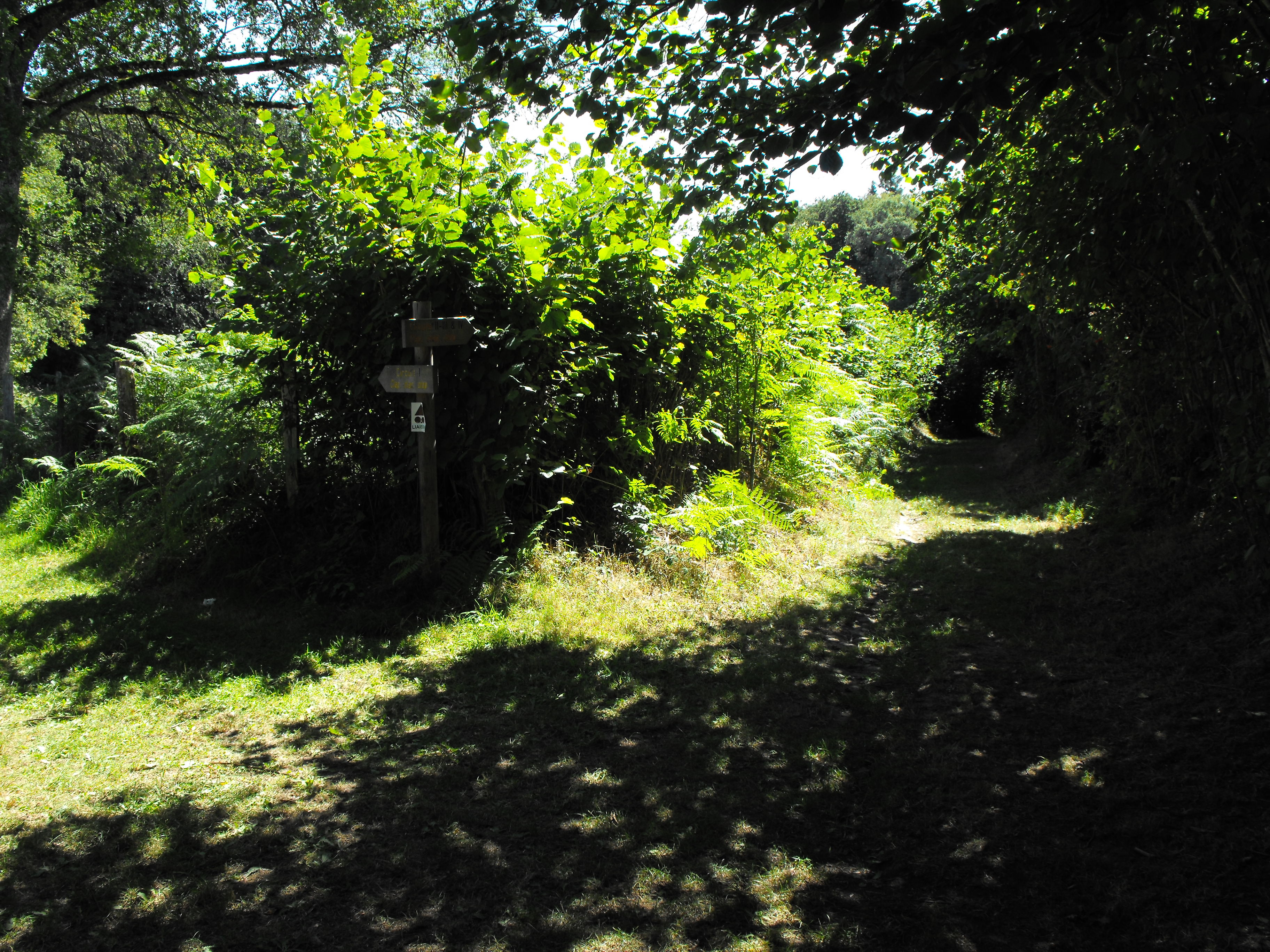 Au départ des sentiers Clap Clap Clop (1,2,3 et 4)